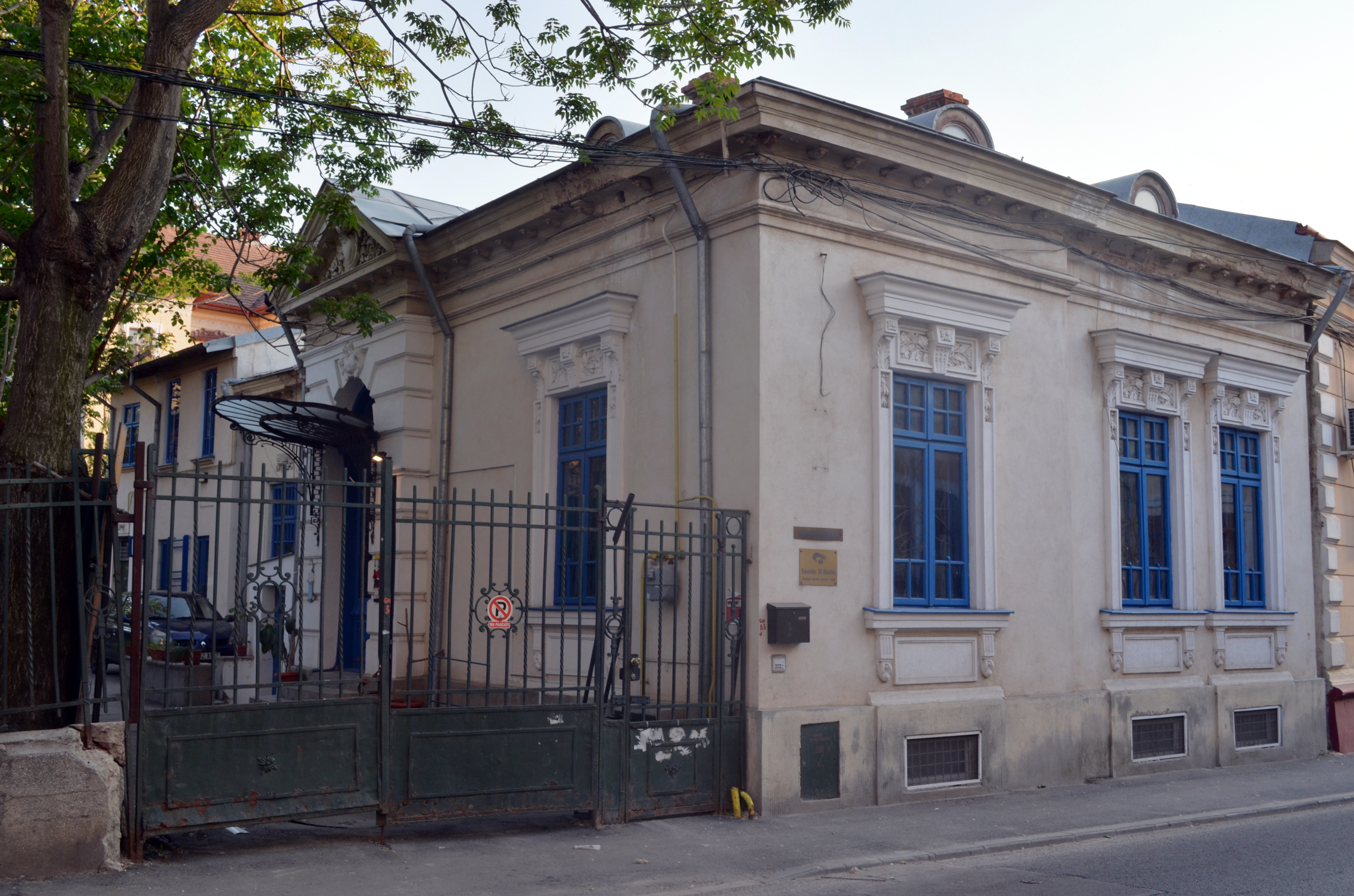 Casă, Strada Matei Basarab nr. 50, Sector 3, București